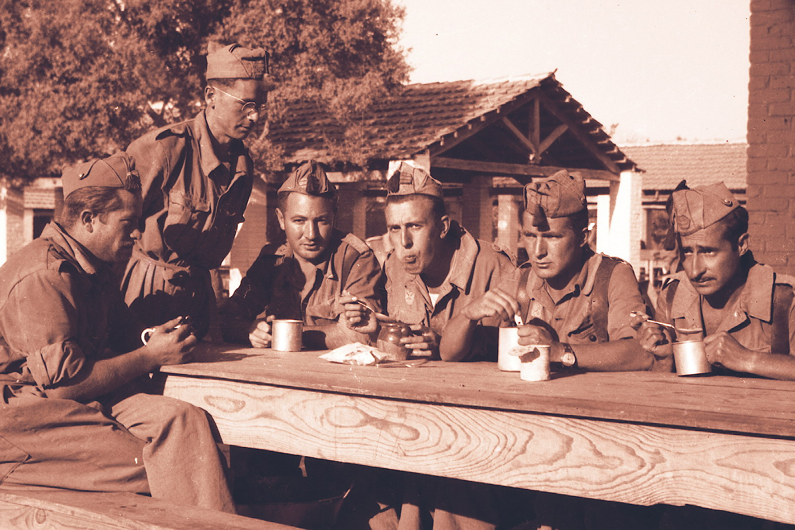 haciendo el servicio militar (mili). Años 40